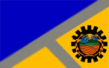 BANDERA DE MUNICIPIO BRUZUAL